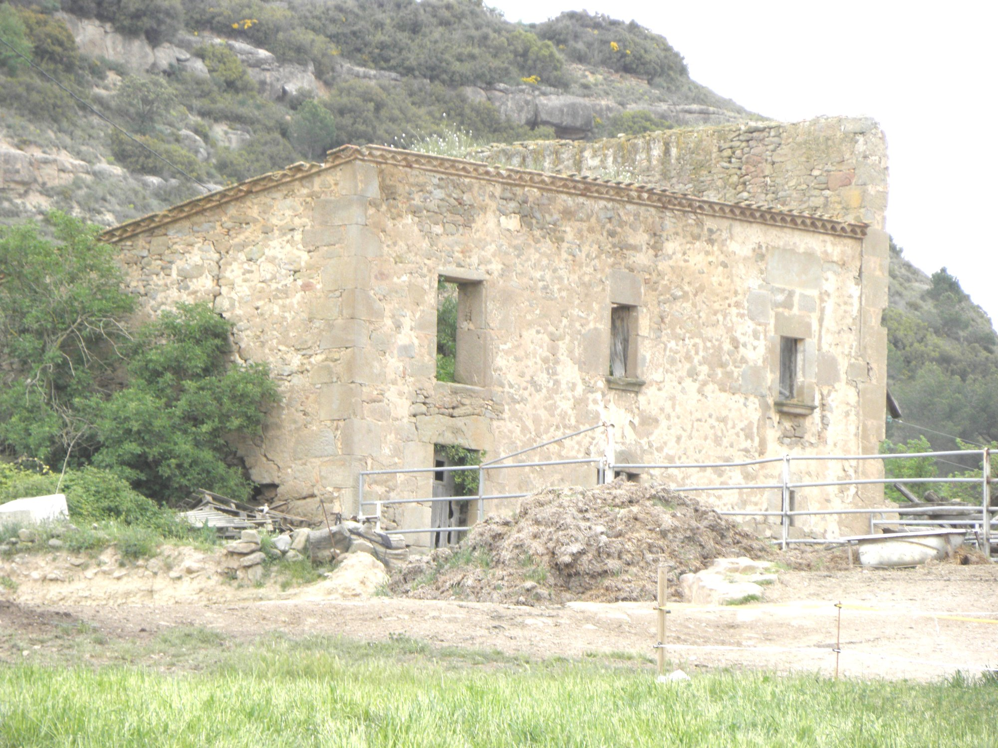 Les runes de la masia de Mirabella, damunt del parc de la Mare de la Font, a Solsona (Solsonès)